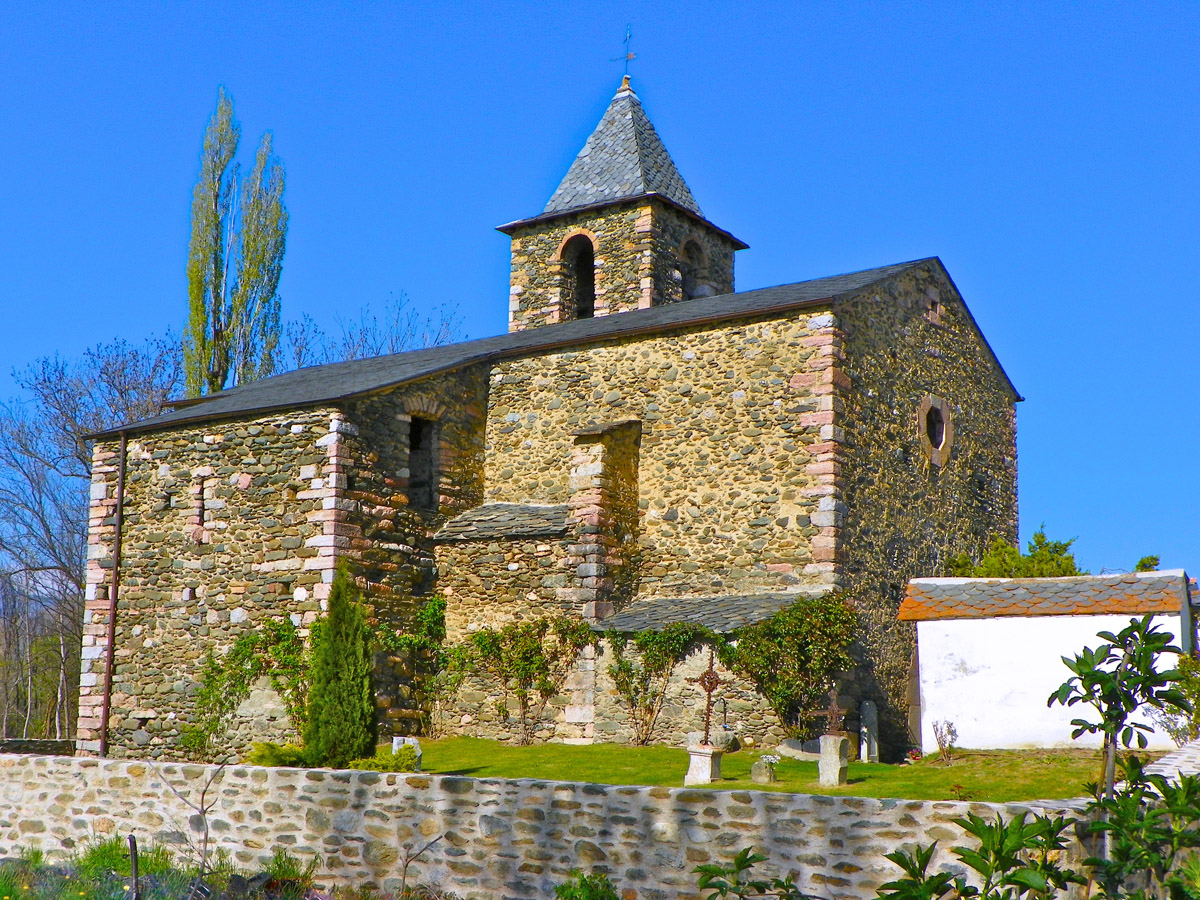 Santa Eulàlia d'Estoll